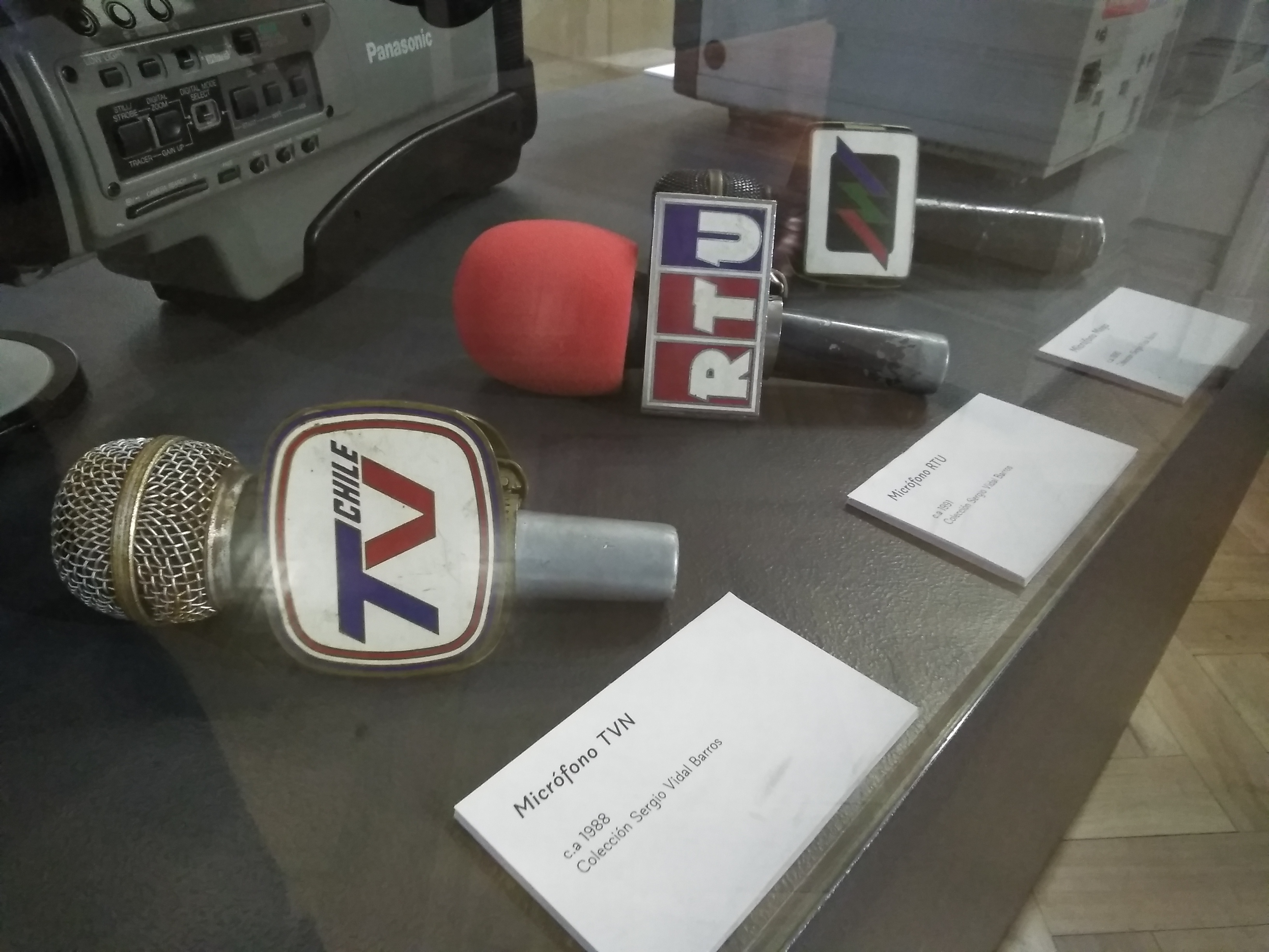 Antiguos micrófonos utilizados por canales de televisión de Chile (c.1991): TVN, RTU y Megavisión.